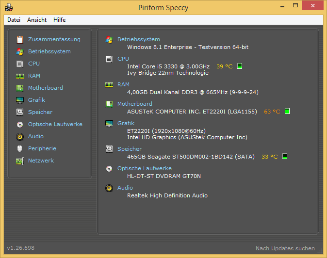 Speccy 1.26.698 unter Windows 8.1